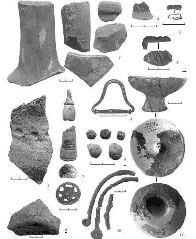 поховальний інвентар з Мар'ївк